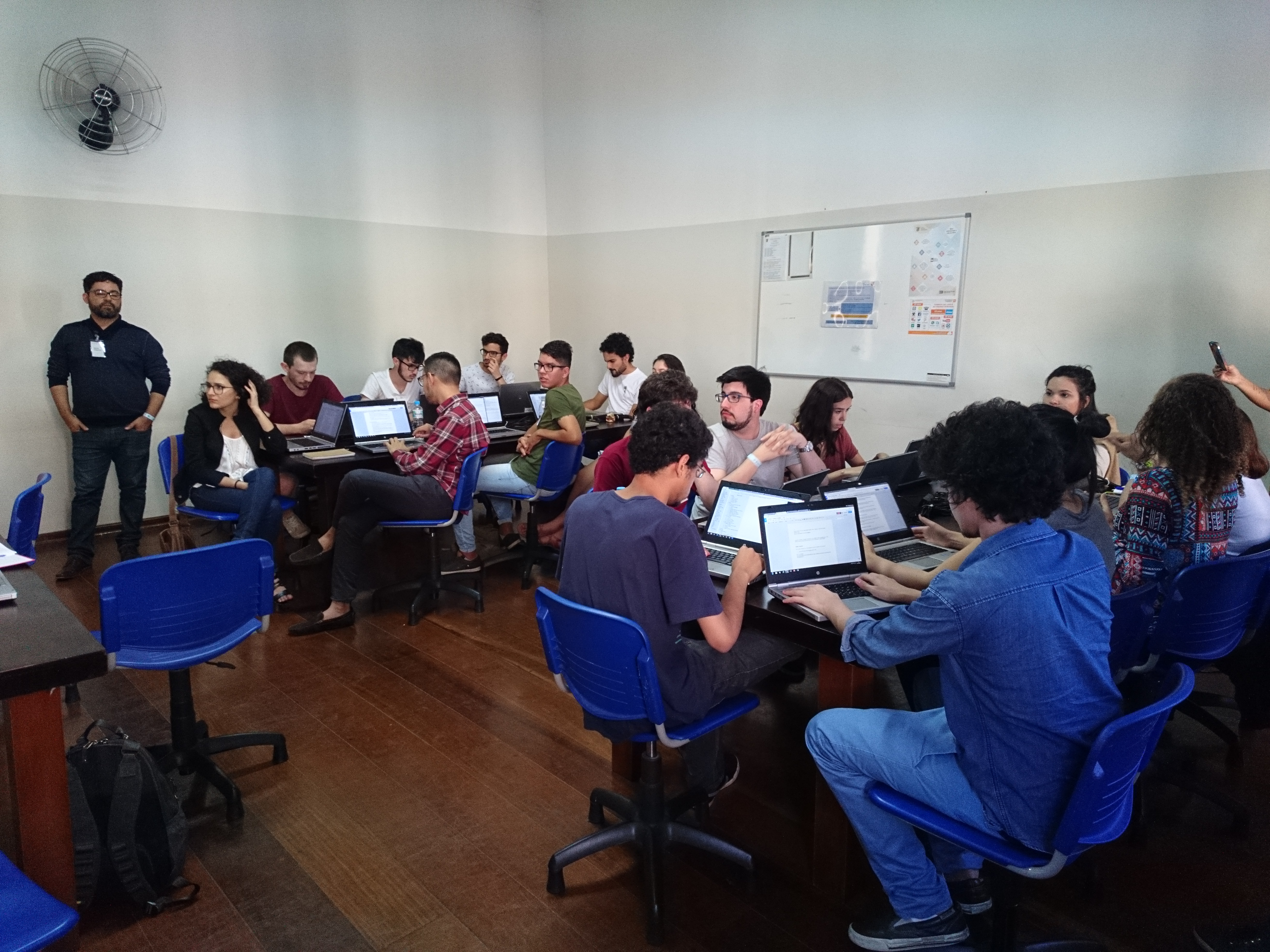 Oficina de edição e checagem durante o Festival piauí GloboNews de Jornalismo Colégio Dante - São Paulo